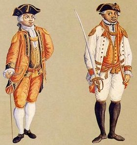 Álbum de aquarelas sobre uniformes militares do período colonial brasileiro, provavelmente do século XVIII, de várias regiões do país.